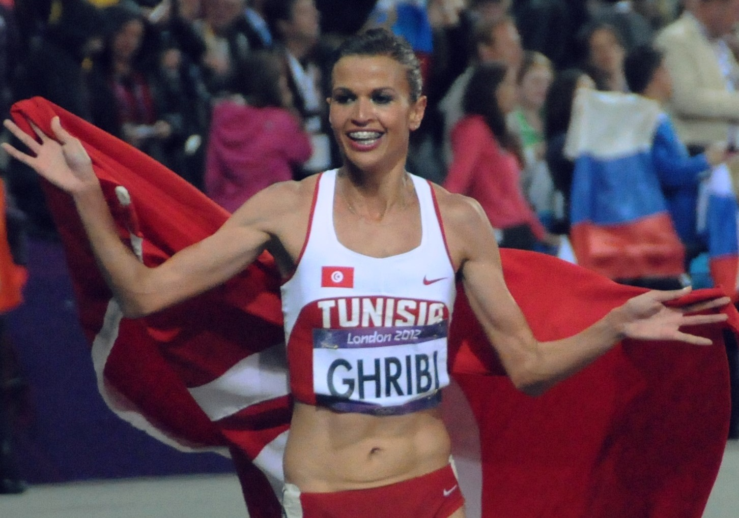 Habiba Ghriba fêtant sa médaille d'argent olympique à Londres (médaille qui sera transformée en OR après la disqualification de la russe Yuliya Zaripova)